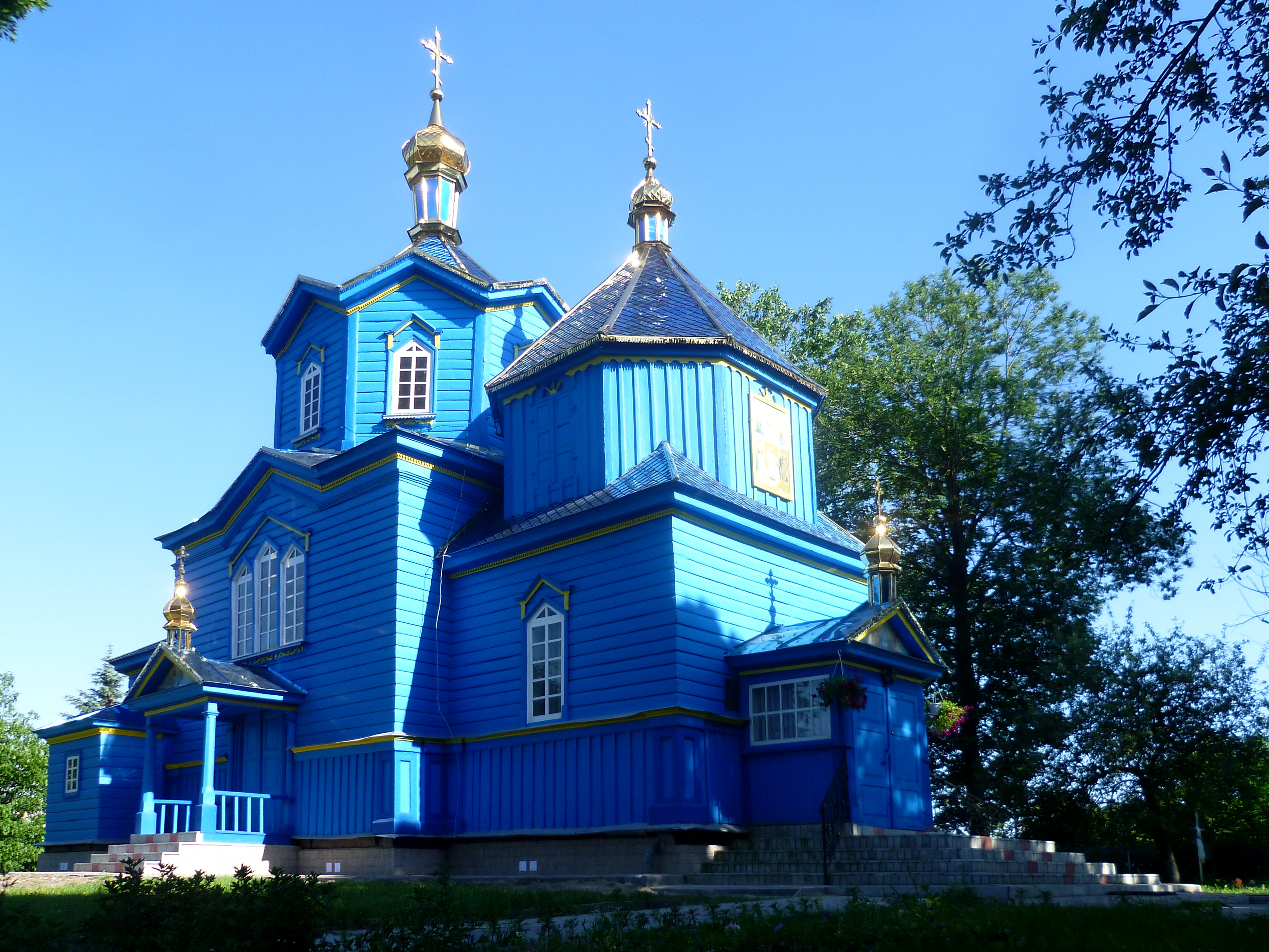 Покровська церква (дер.) (1750-1880 роки) - вигляд з північного заходу - с.Поромів (вул.Центральна) Іваничівський район Волинська область Україна